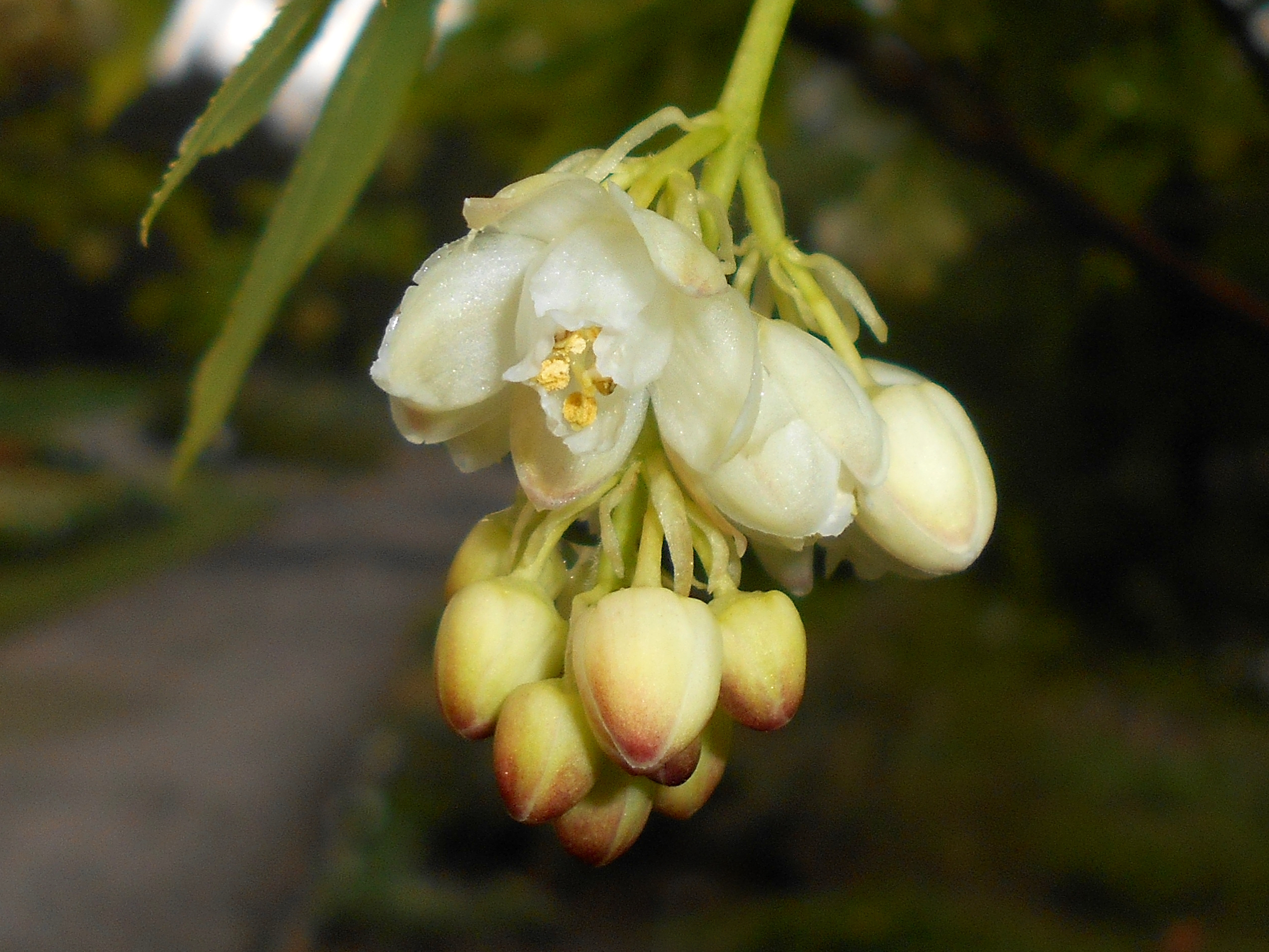 Kłokoczka południowa (Staphylea pinnata), Ogród Botaniczny UMCS w Lublinie.